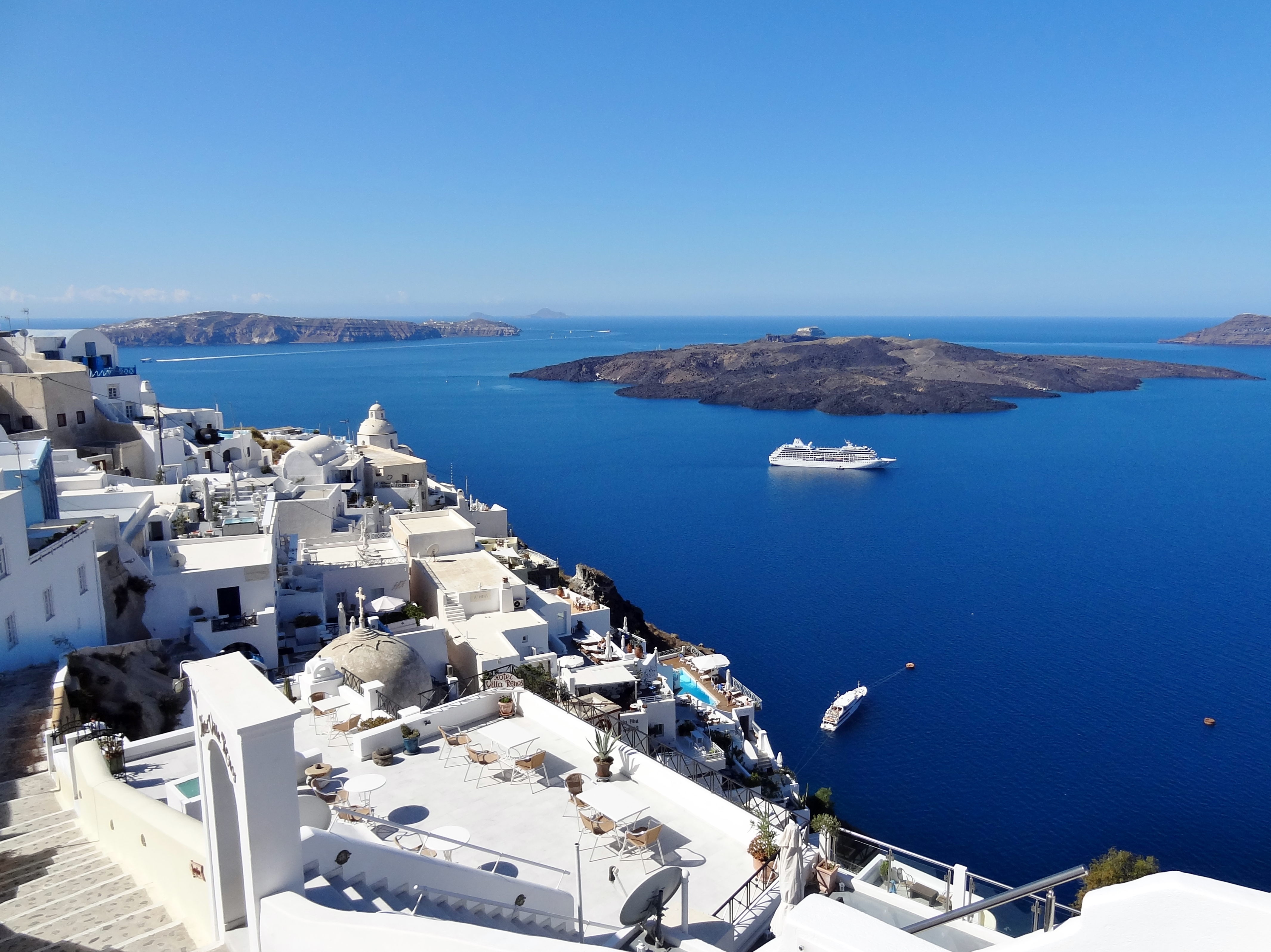 Fira an der Caldera von Santorin, Kykladen, Griechenland